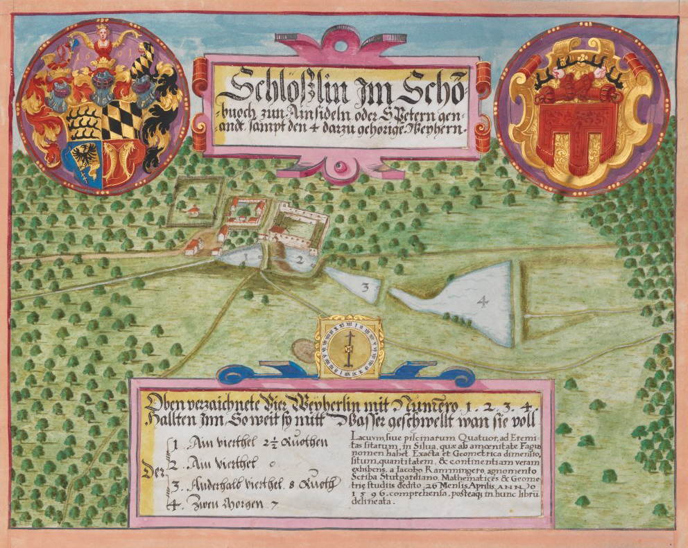 Seehbuch, darinnen alle Seeh und Weyher in dem löplichen Hertzogthumb Würtemberg. Stuttgart (?), Anfang 17. Jh.; Württembergische Landesbibliothek Stuttgart, Cod. hist. fol. 261, fol. 3r, Detail: Einsiedel